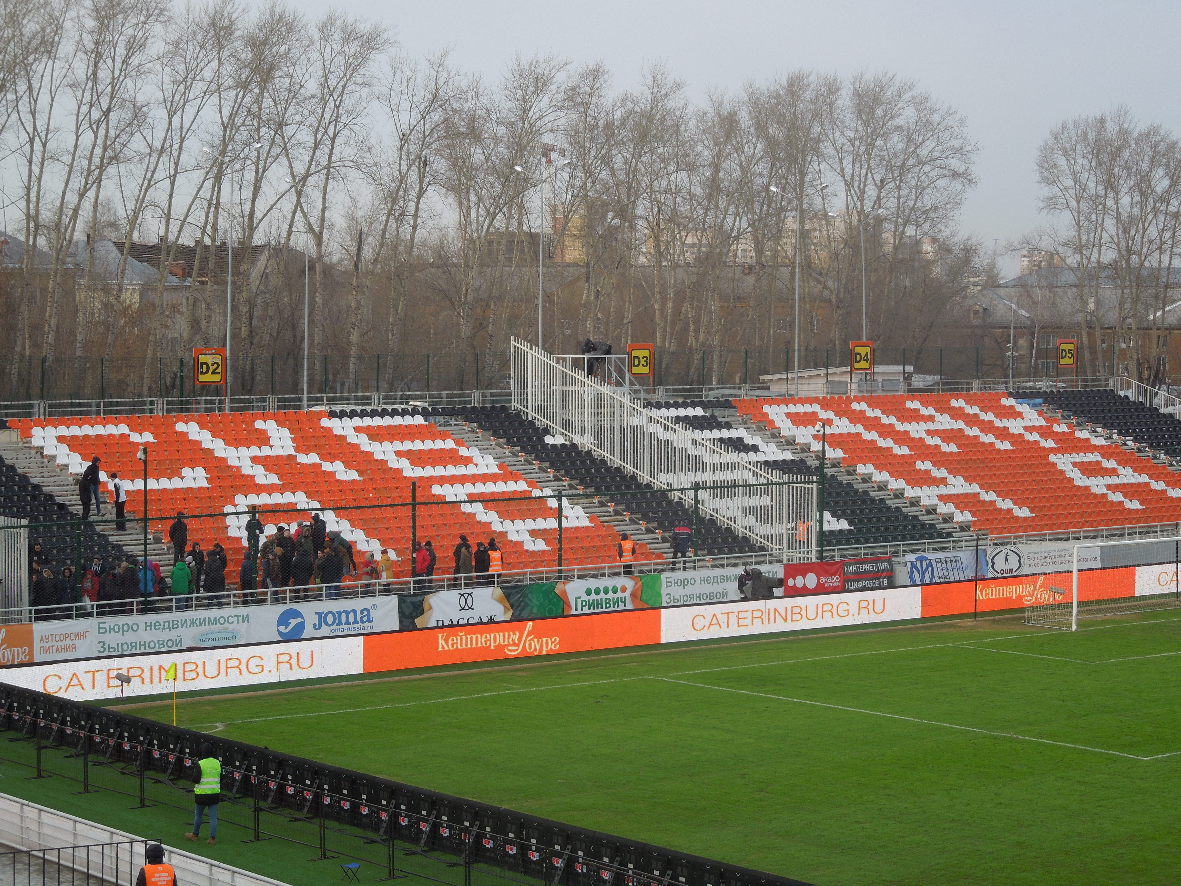 Матч "Урал" - ."Рубин", СКБ-Банк Арена